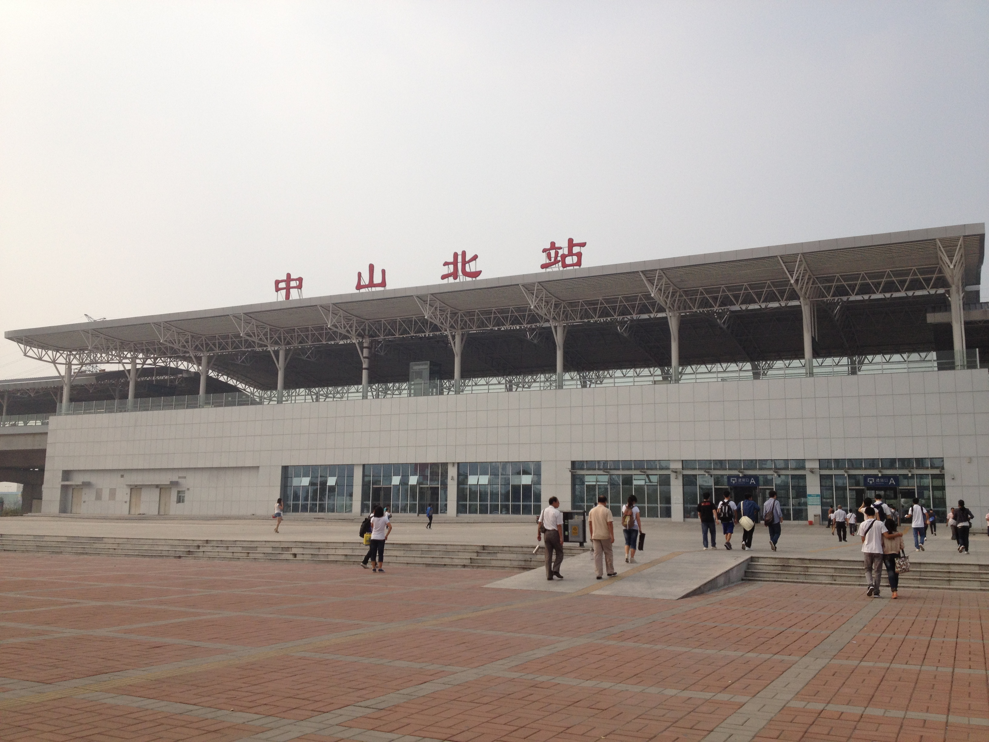 中山北站外观。